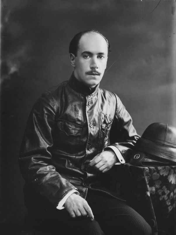 Игорь Иванович Сикорский, русский авиаконструктор, в летной форме